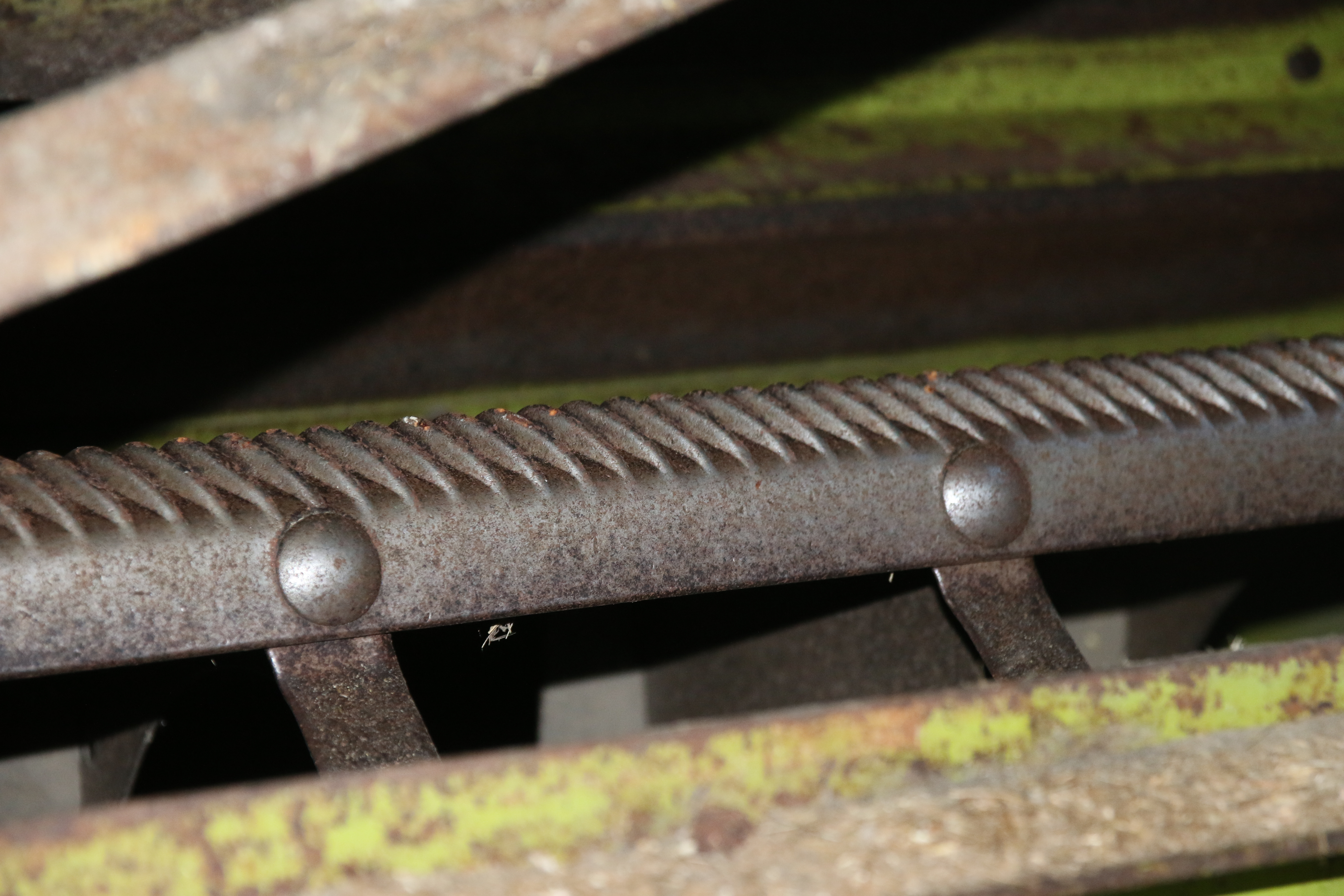 Dreschtrommel eines Matador Gigant